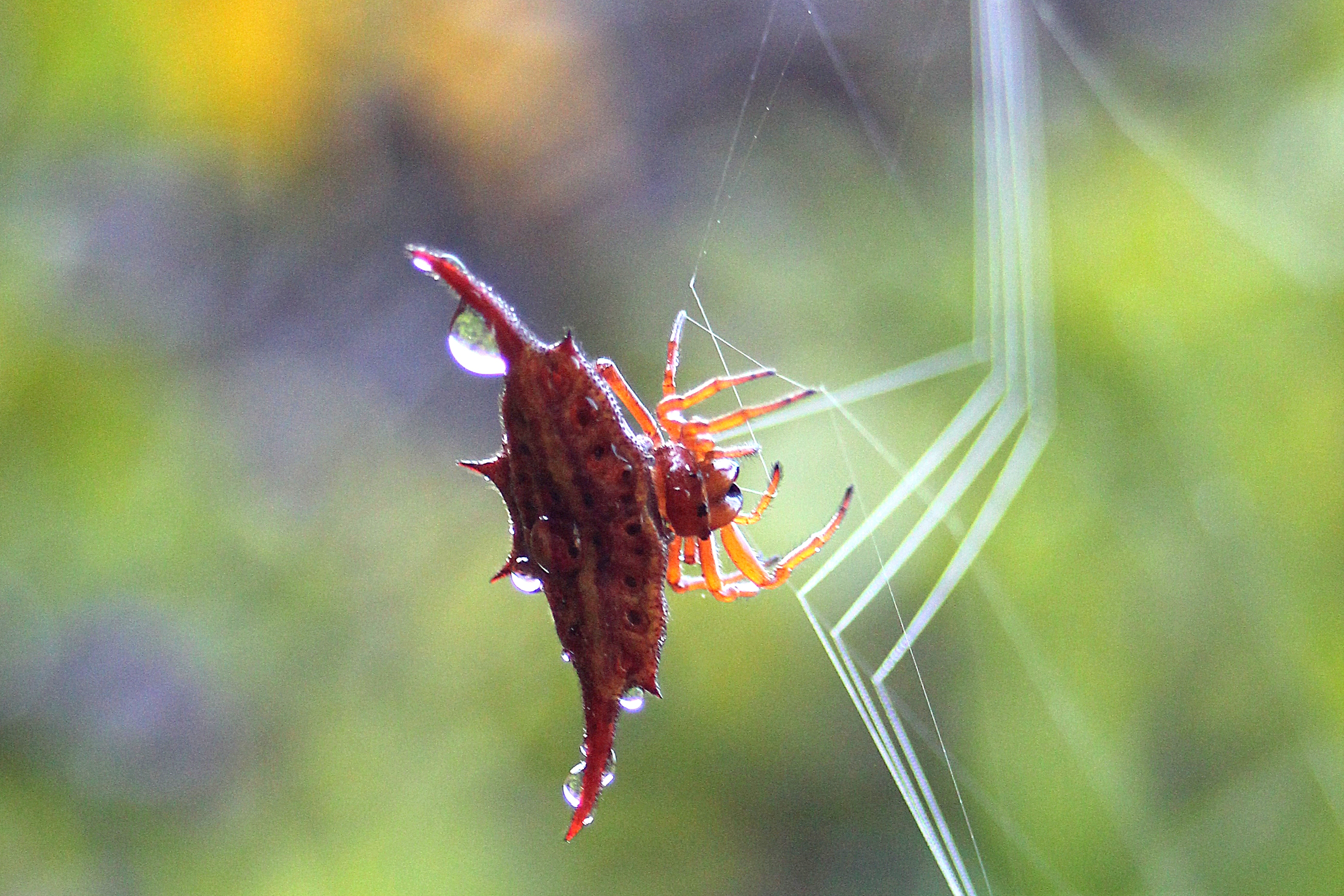 Gasteracantha versicolor, Andasibe